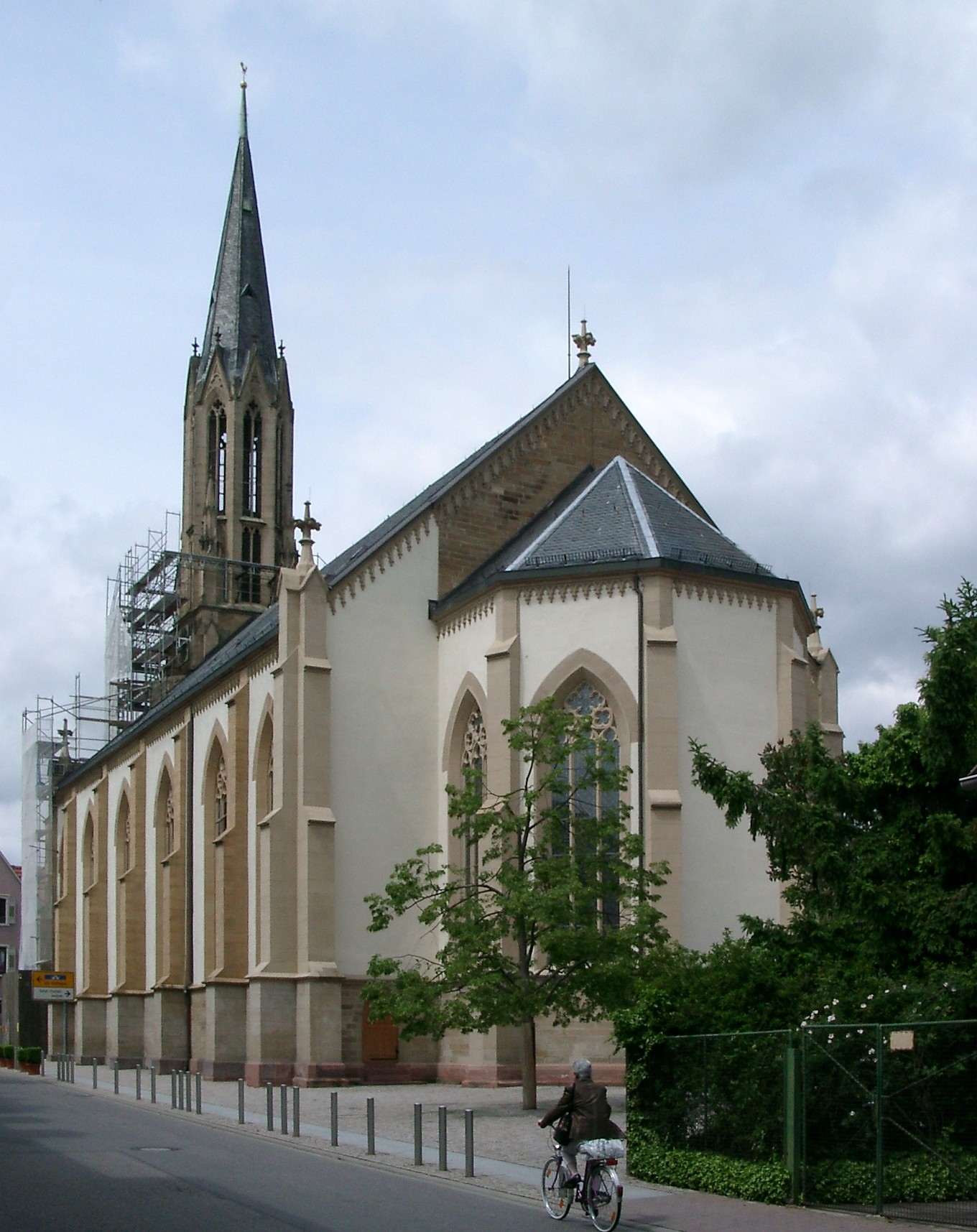 Walldorf (Baden), Evangelische Kirche